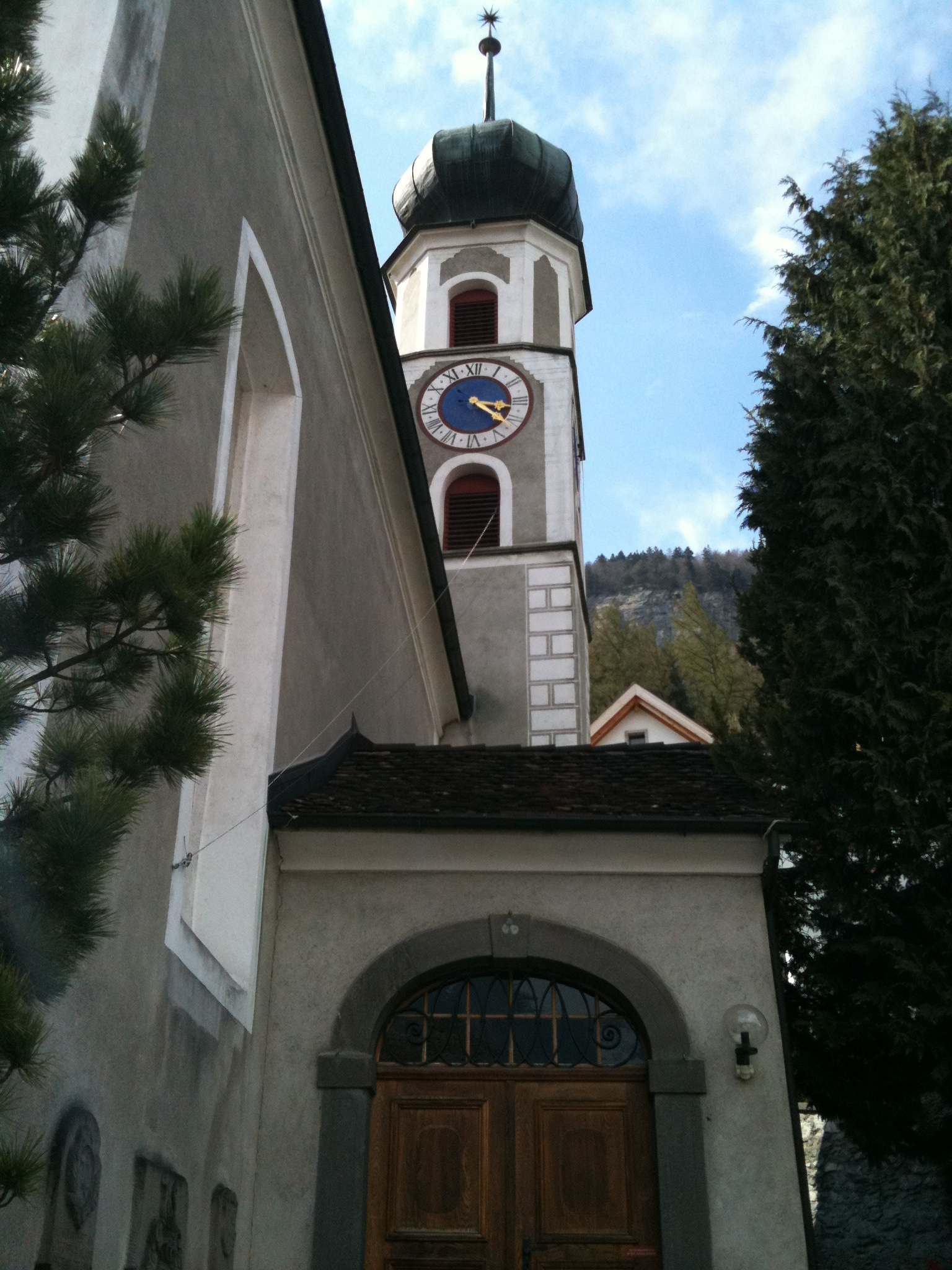 reformierte Kirche Haldenstein, Kanton Graubünden